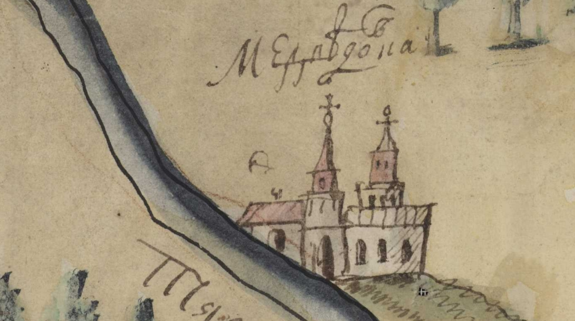 Фрагмент карти Київської губернії. XVIII століття. РГАДА, ф. 192, оп. 1, Киевская губ., № 5.